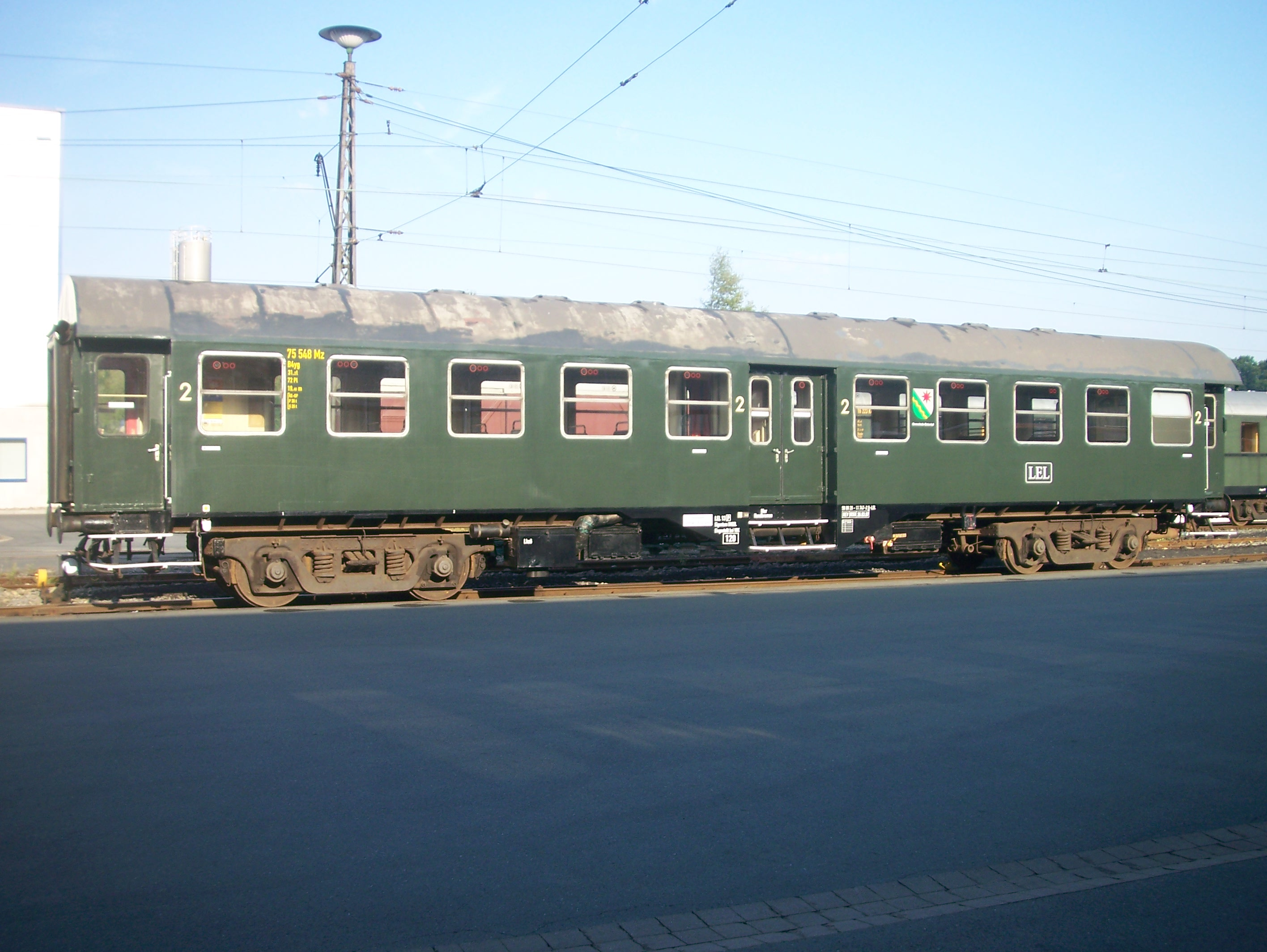 Umbauwagen der Gattung B4yg, der Landeseisenbahn Lippe